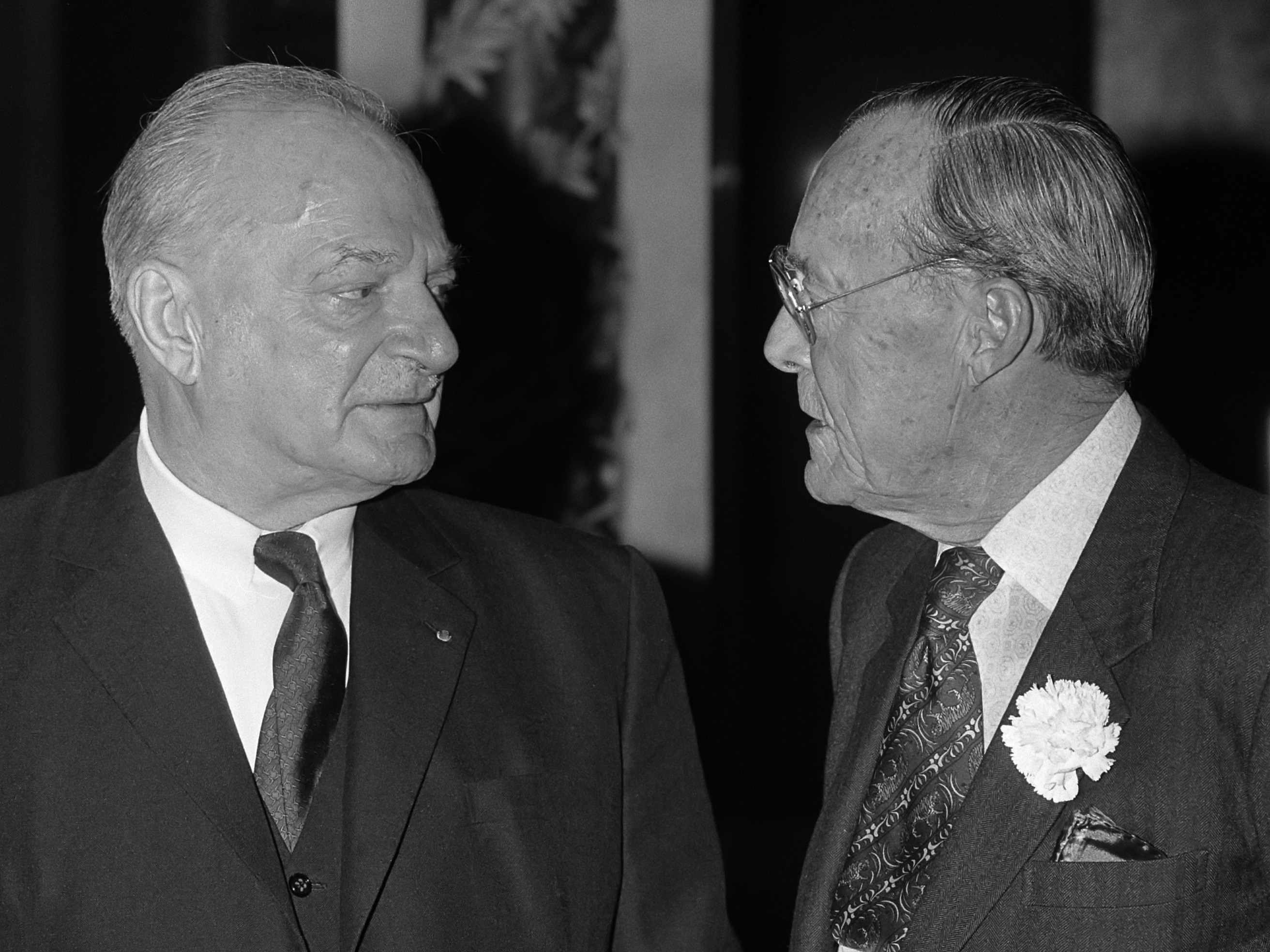 Prins Bernhard reikt Erasmusprijs'85 uit aan Franse stedebouwkundige Paul Delouvrier 26 november 1985